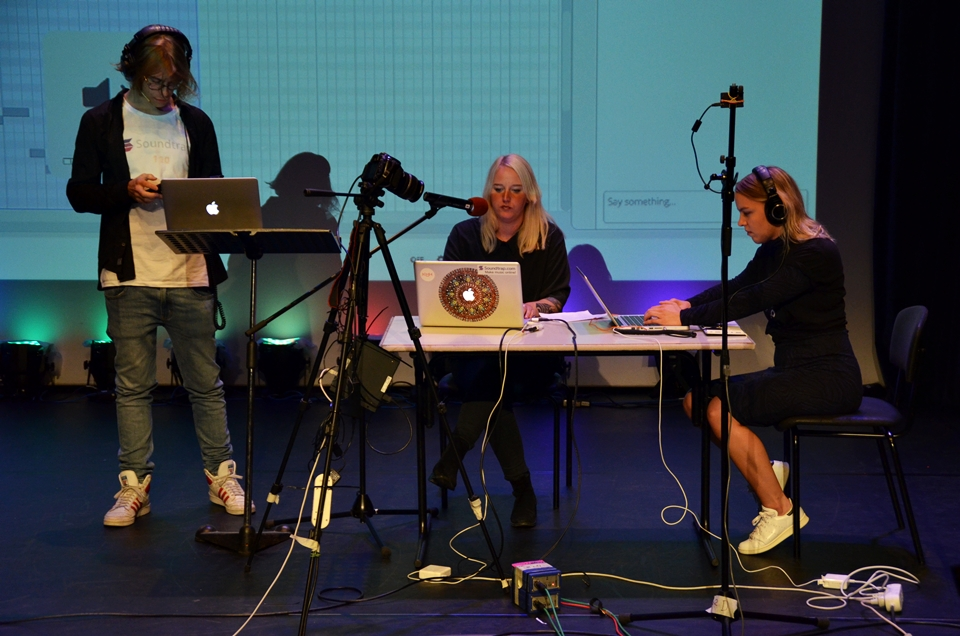 Soundtrap - Jonas Lundquist, Vanja Steinholtz & Linnéa Rodén 8 from Flickr album "#MTFCentral " by Music Tech Fest